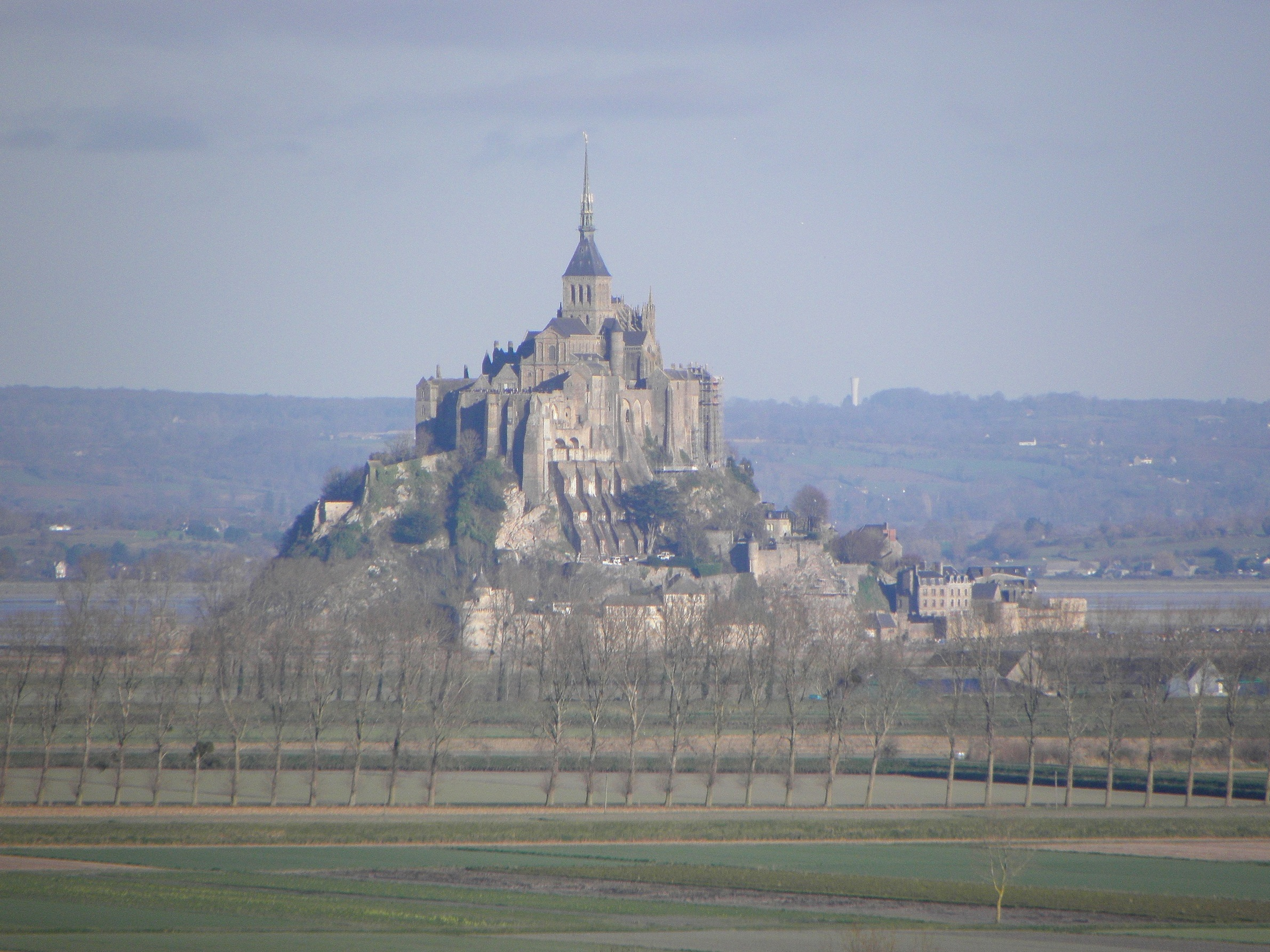 Le Mont-Saint-Michel vu du Belvédère de Roz-sur-Couesnon.